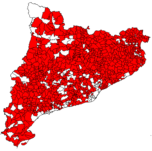 Mapa municipal del Principat de Catalunya on figuren en vermell els municipis adherits a l'AMI.